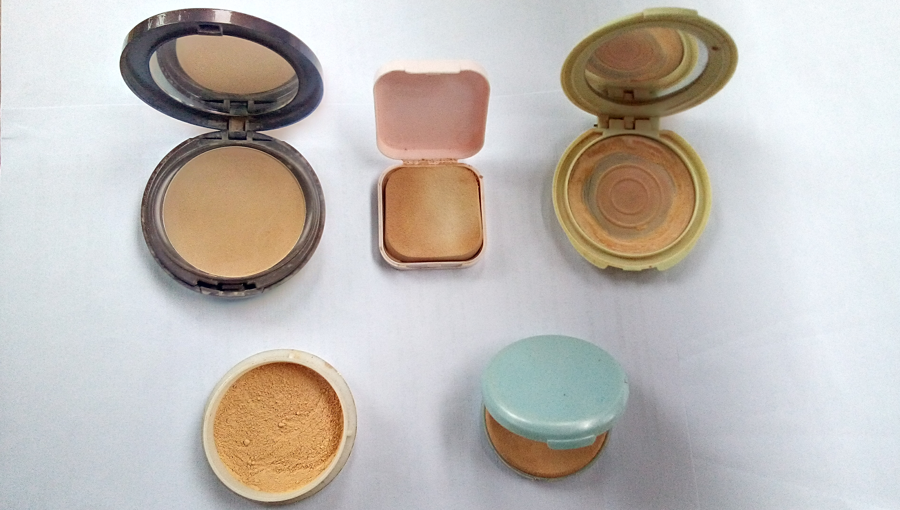 Jawa: Bedak utawa wedhak iku sawijining kosmètik sing dianggo ing rai